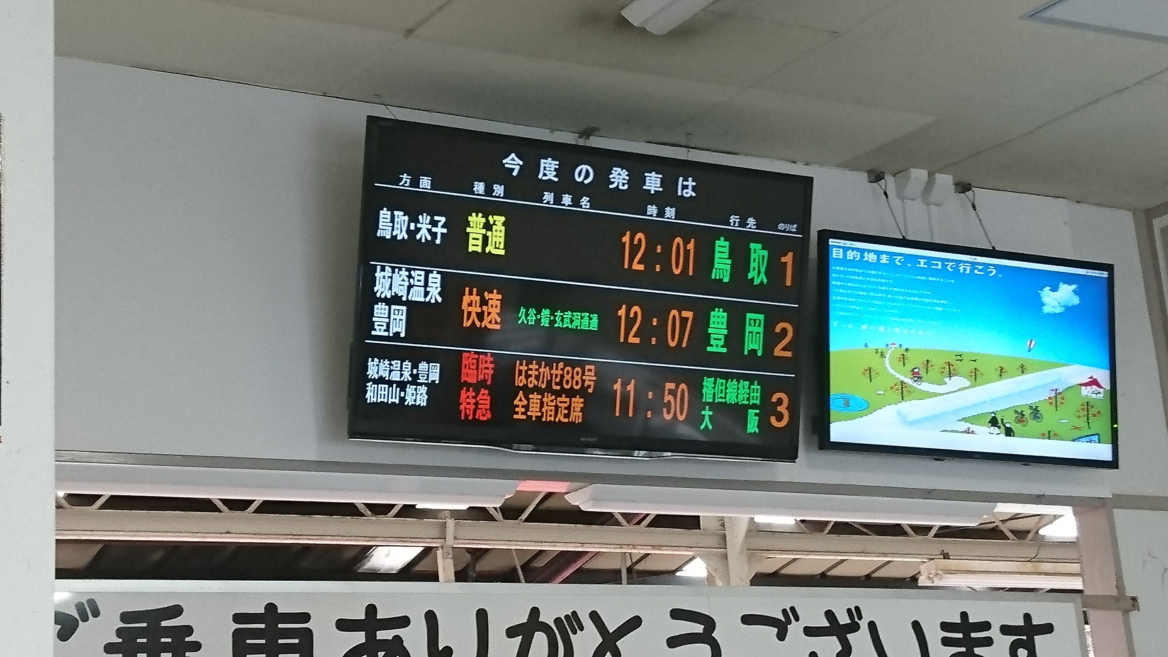 浜坂駅改札口の発車標